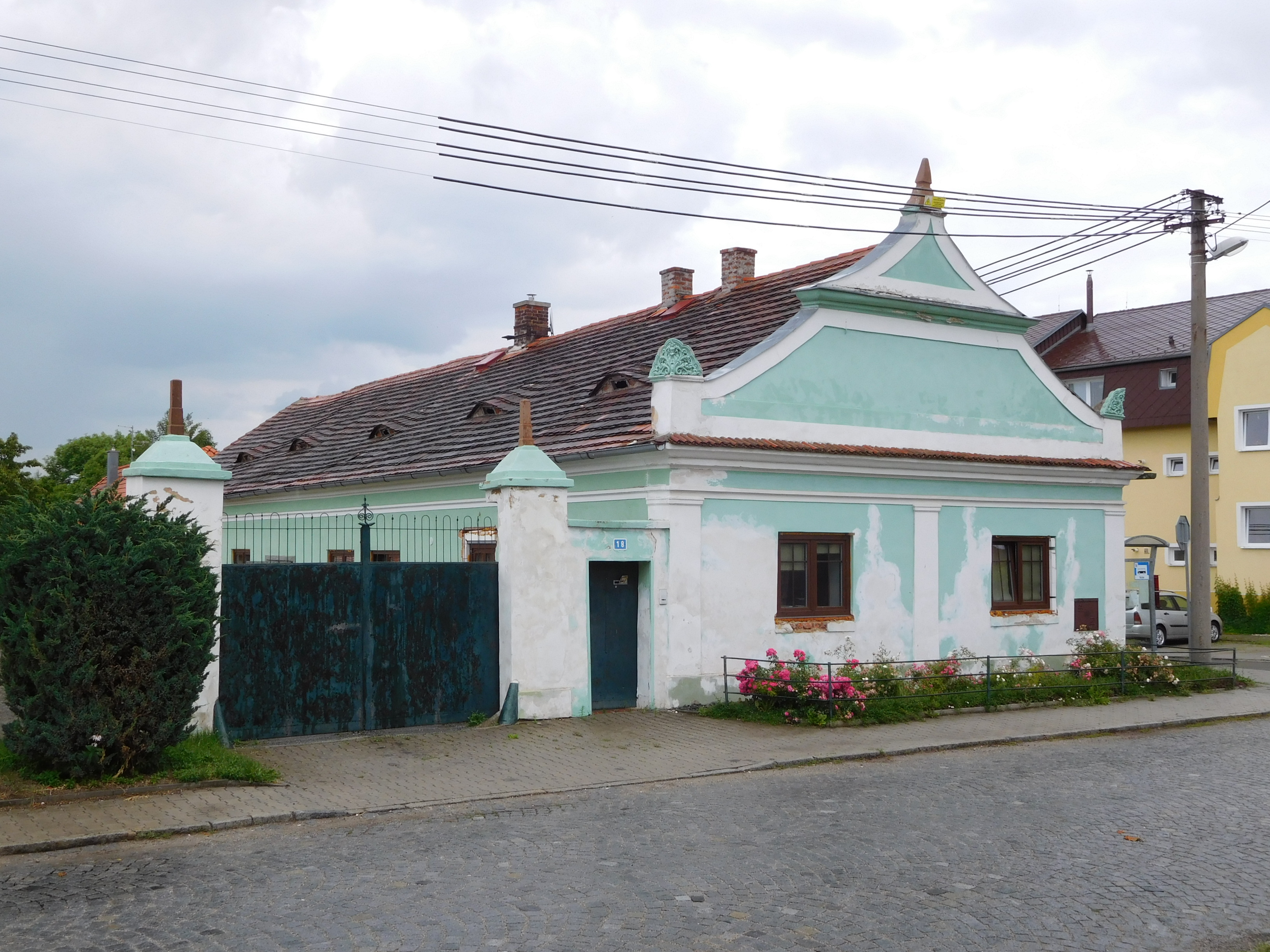 Vochov - dům č.p. 18